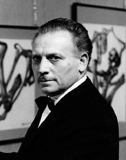 Agostino Barbieri